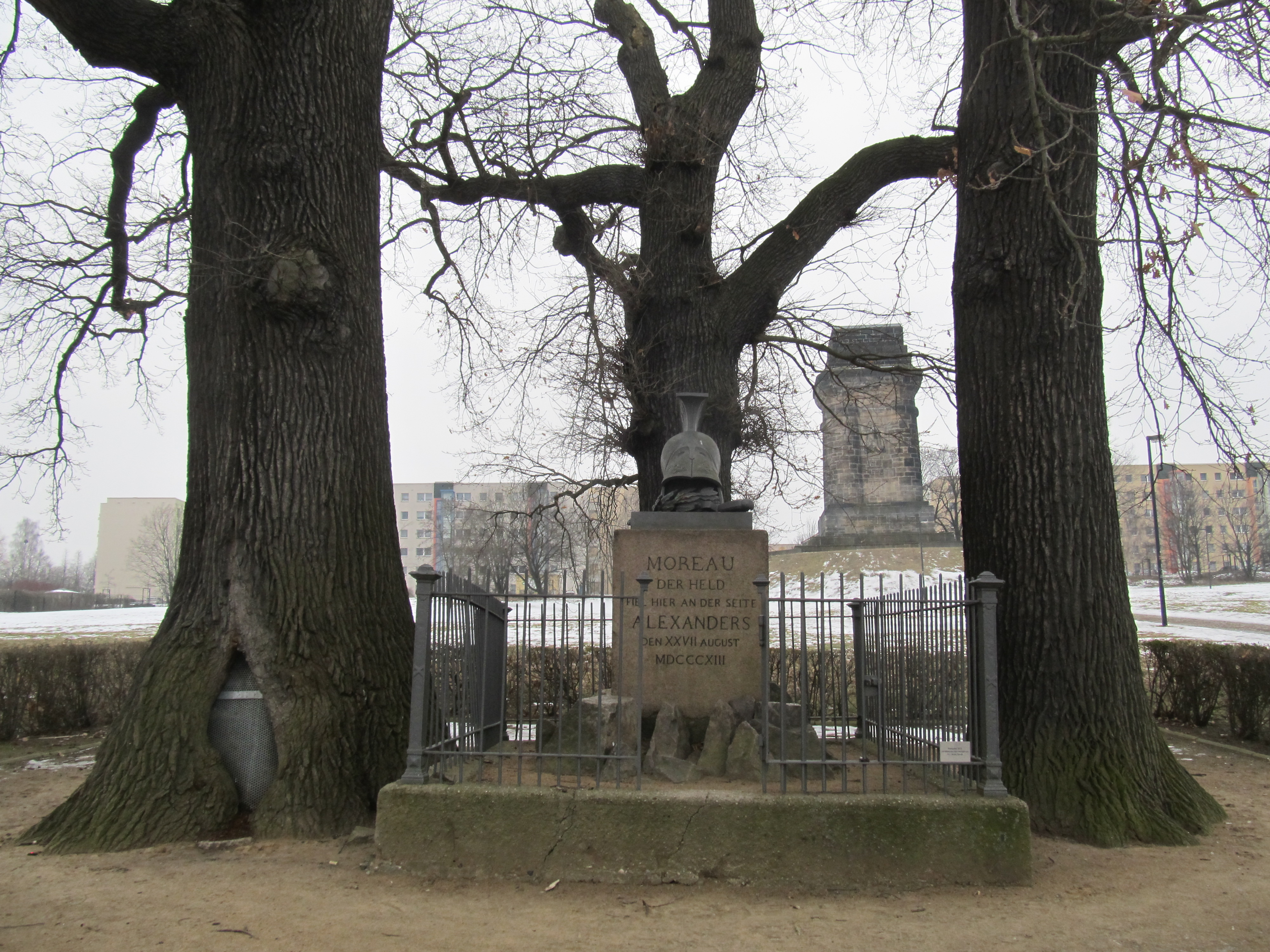 Moreau-Denkmal, Dresden, mit Stämmen der drei Moreau-Eichen